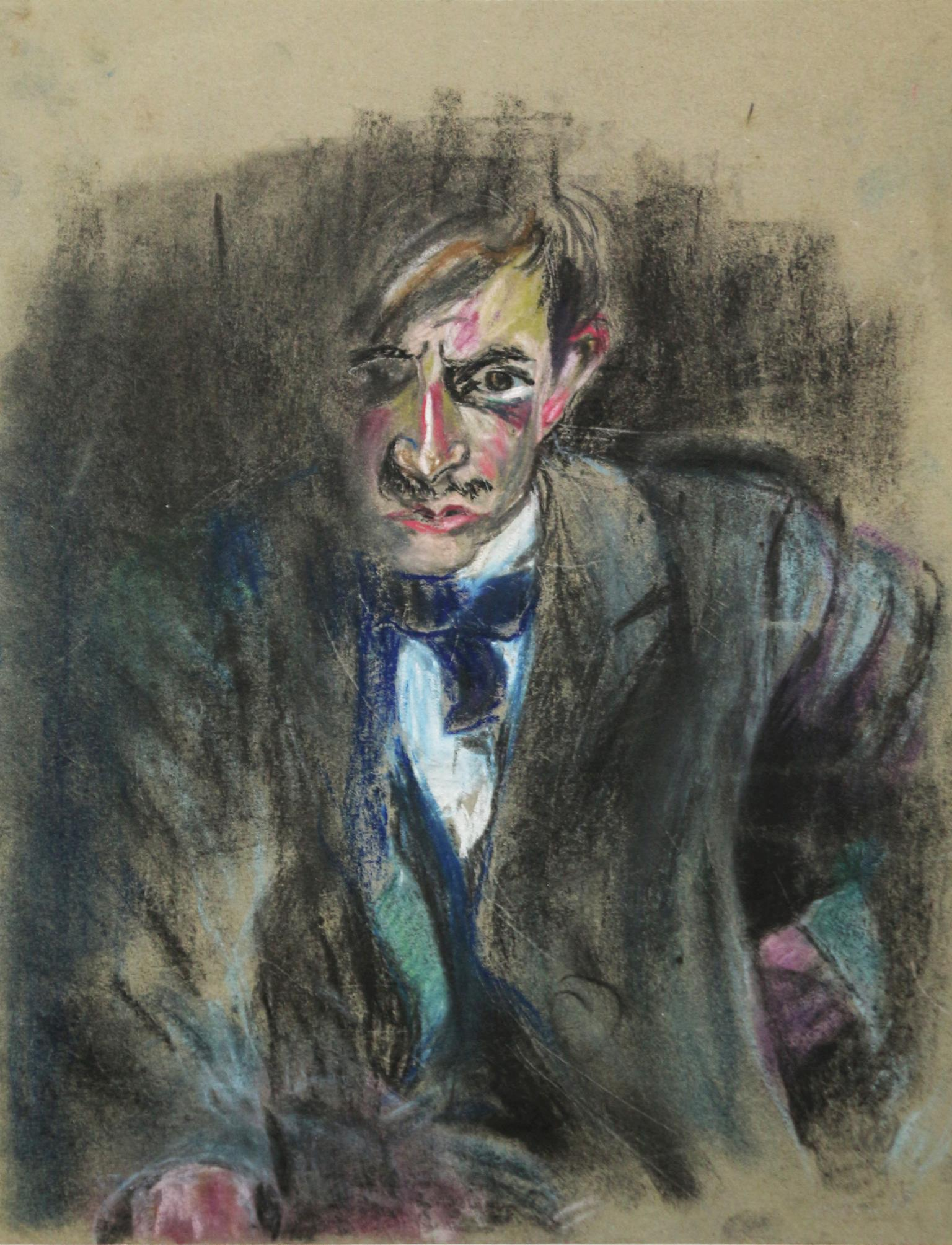 Selbstporträt